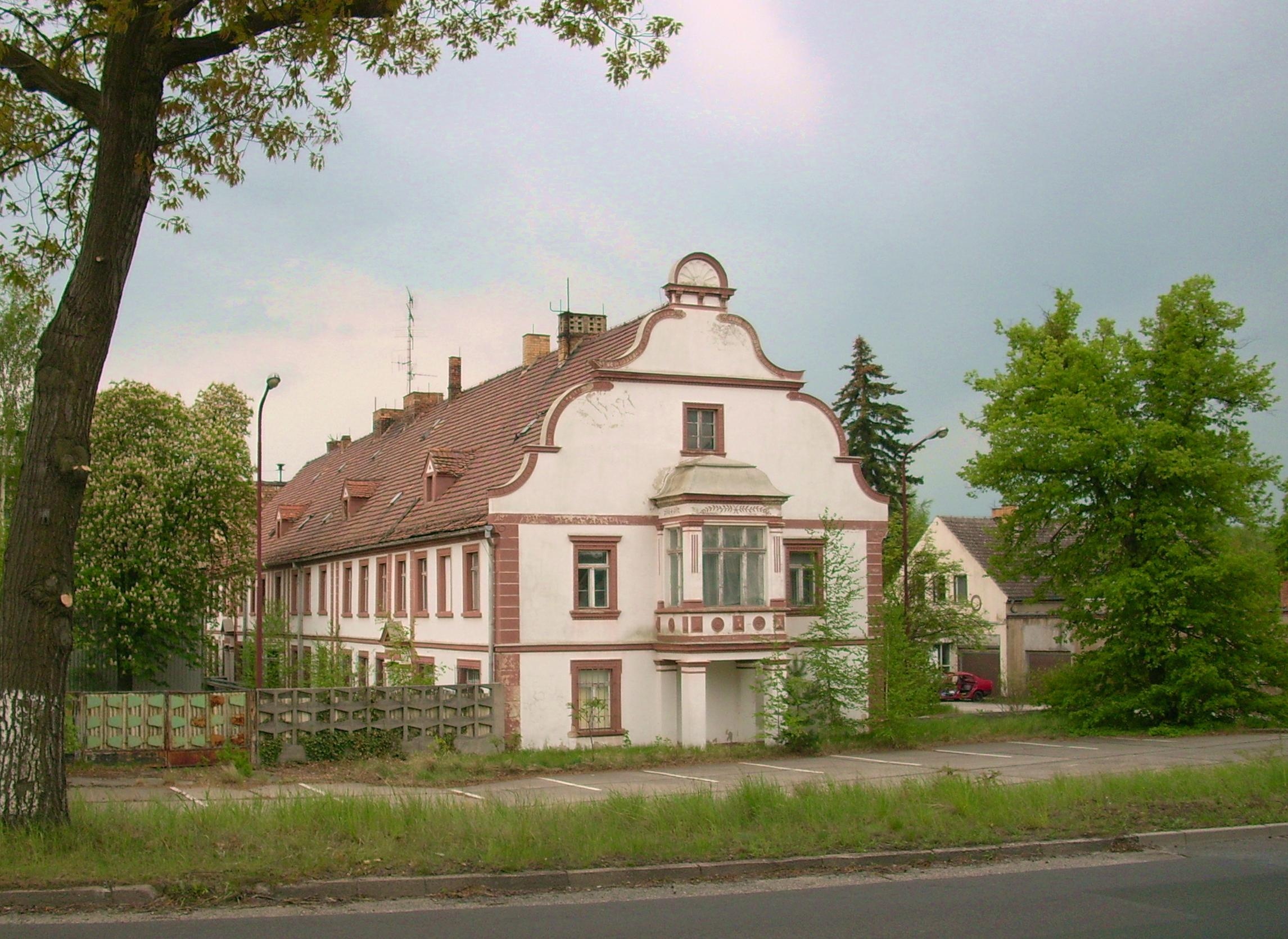 Wohnhaus, Hoyerswerdaer Straße in Bernsdorf (Oberlausitz)